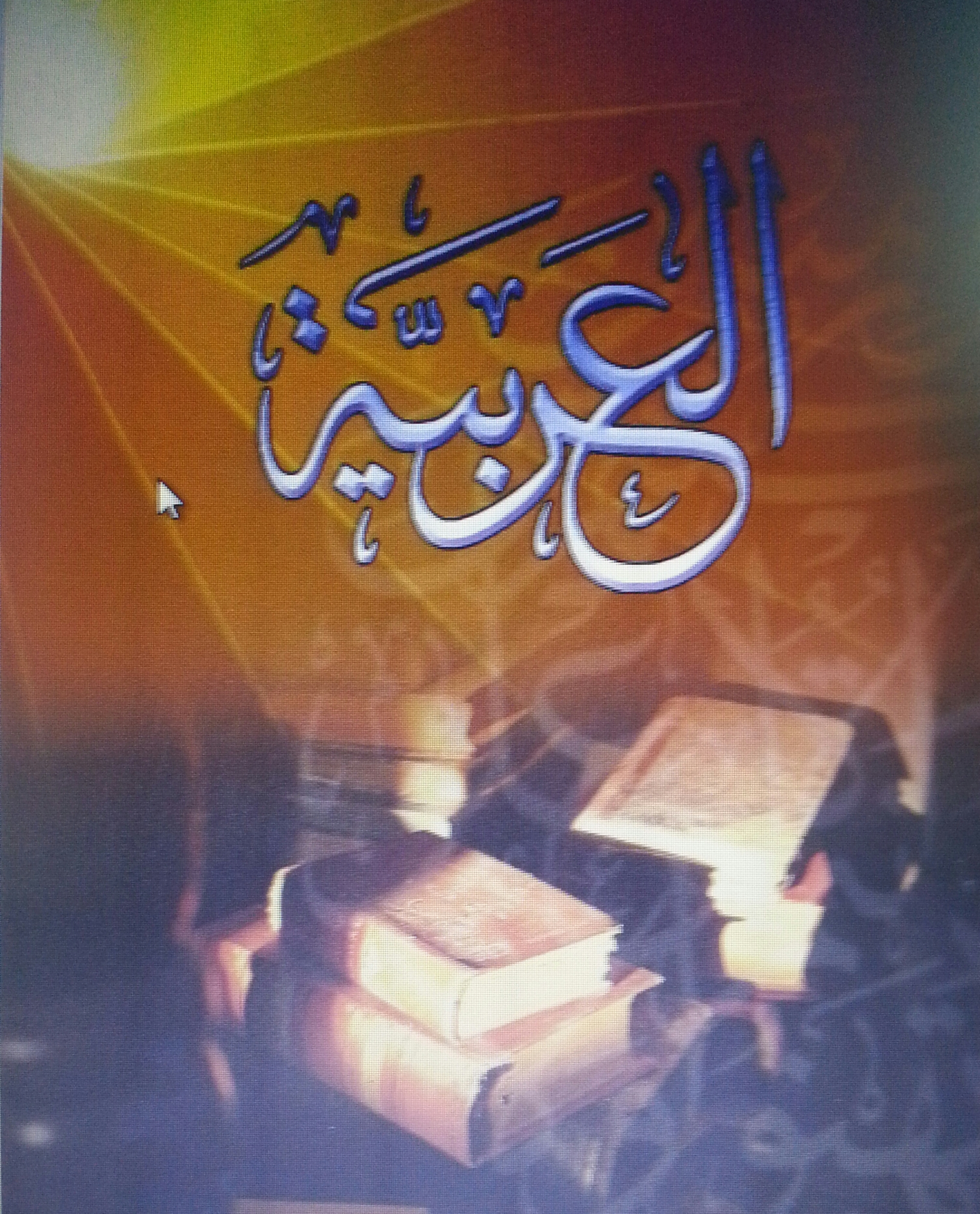 اللغة العربية لغة الضاد ولغة القران.